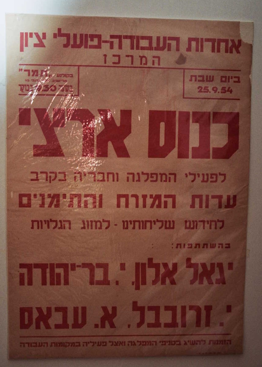 כרזה של אחדות העבודה - פועלי ציון רישיון נוצר על ידי משתמש:עידו